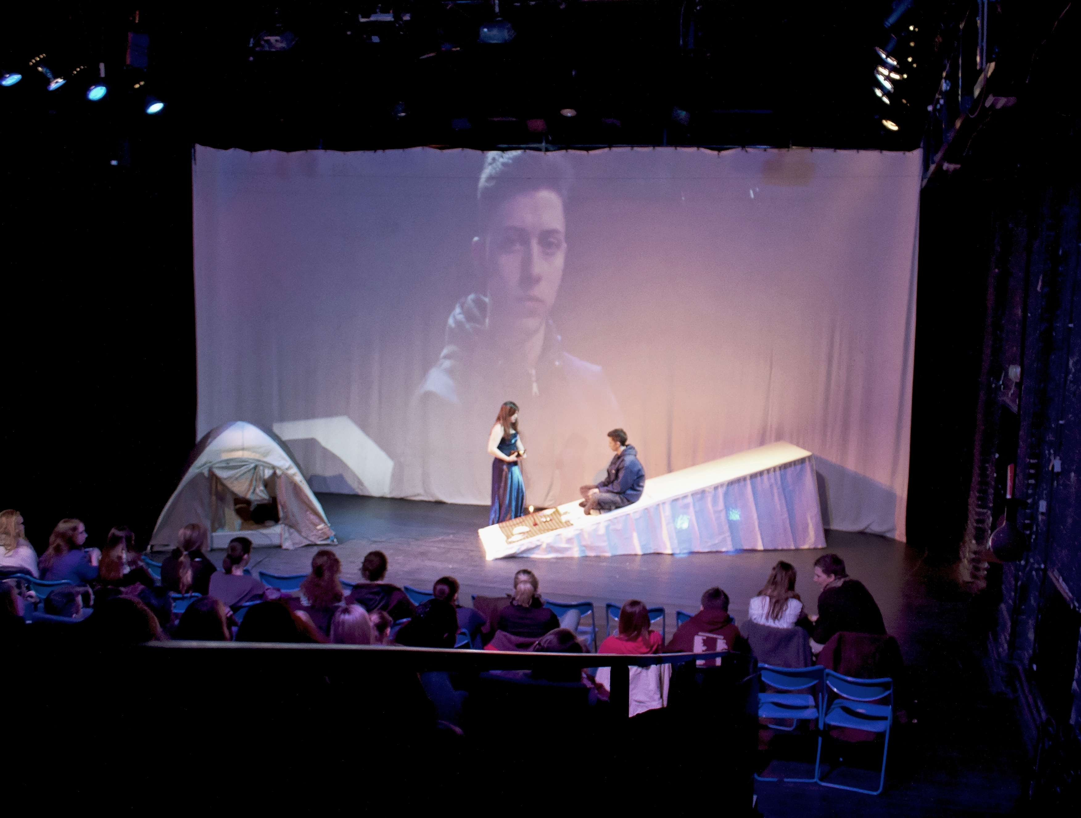 Szene aus einer Aufführung des Zwei-Personen-Dramas norway.today von Igor Bauersima unter der Regie von René Böttcher durch die Studiobühne Siegburg (Lehrbühne der Schauspielschule Siegburg) aus Siegburg in Nordrhein-Westfalen (Deutschland); hier als eingeladene Gastspielaufführung an der Bühne der Kulturen in Köln.